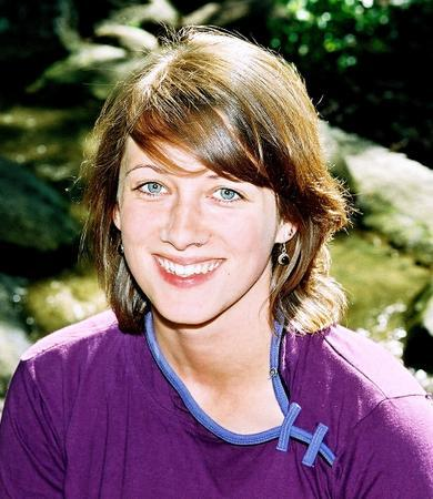 Paula Riester, Bundessprecher GRÜNE JUGEND